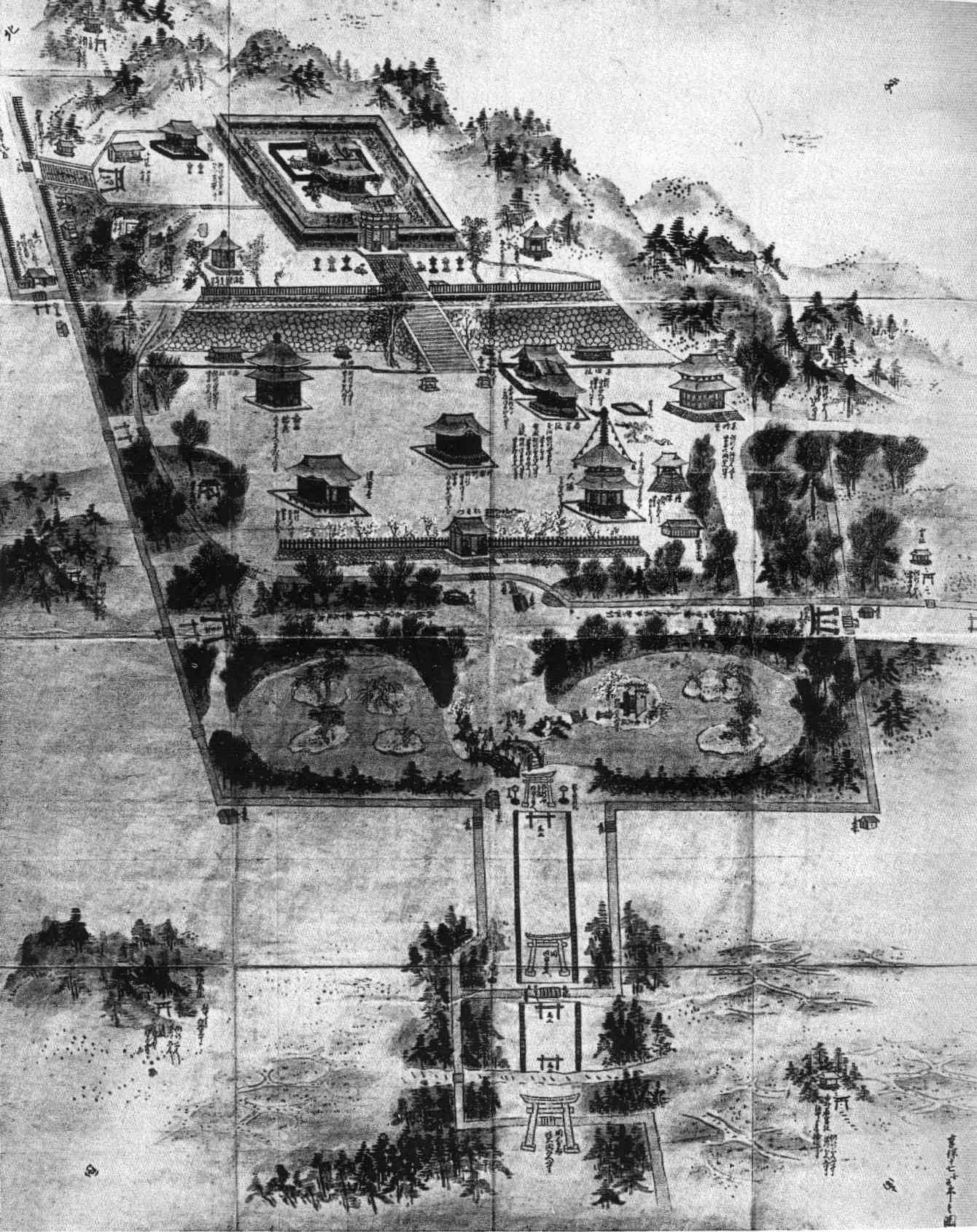 An old drawing of Tsurugaoka Hachiman-gū in Kamakura, Japan